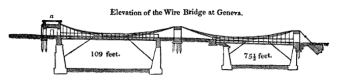 Passarelle de Saint Antoine, Genf, Schweiz